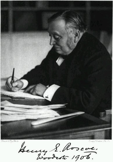 Henry Enfield Roscoe (* 7. Januar 1833 in London; † 18. Dezember 1915 in West Horsley)